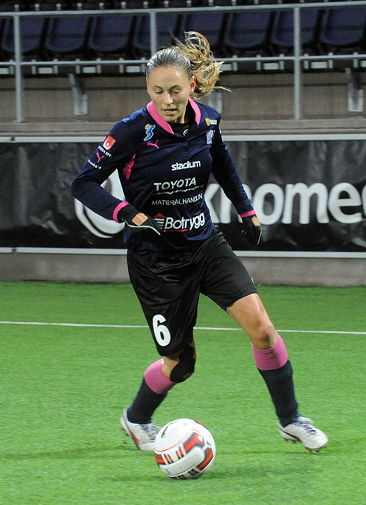 a_36_0281